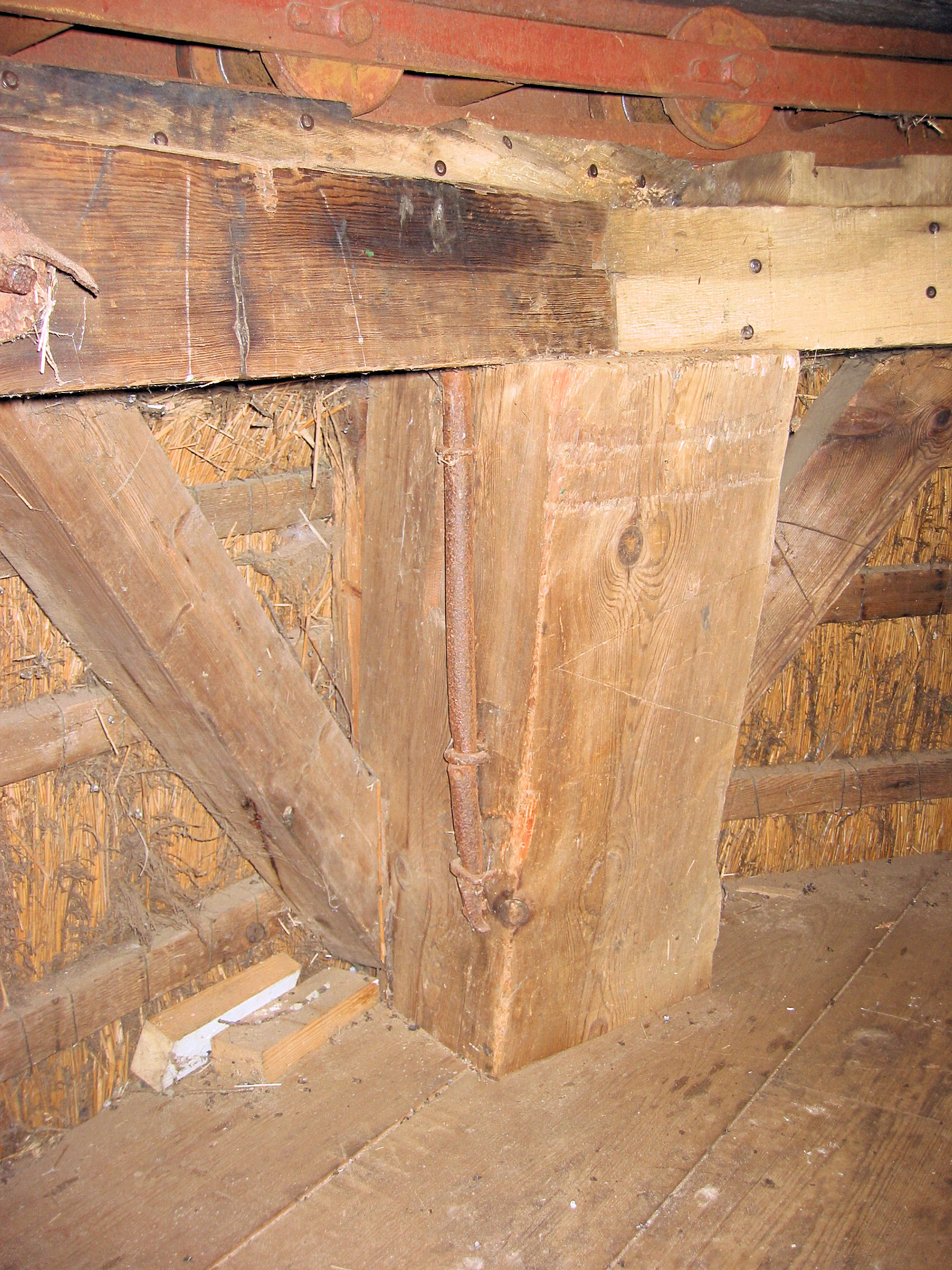 Walderveense molen roosbout toegepast bij achtkantstijl en boventafelement verbinding. Ook is het timmermansmerkteken als krassen te zien